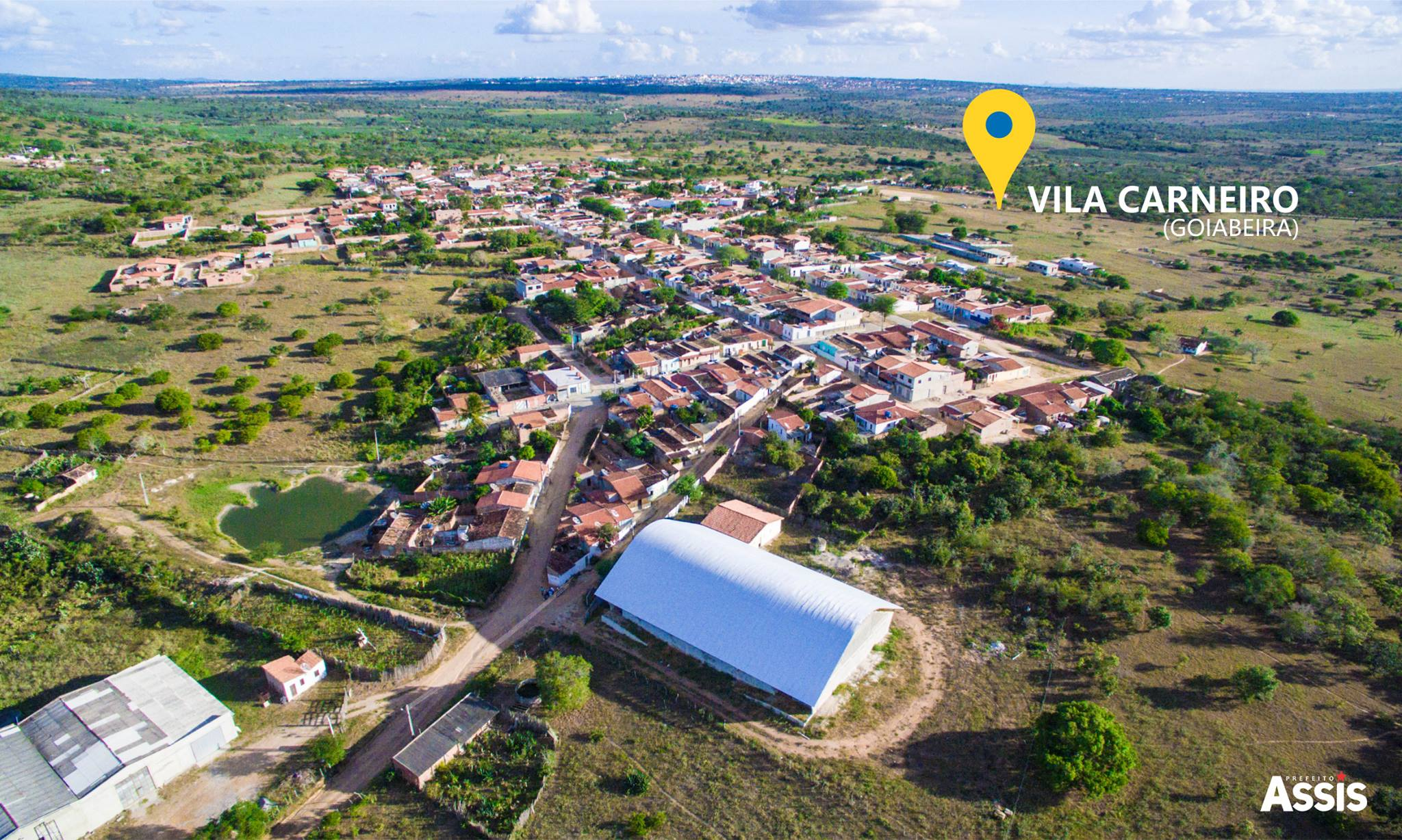 Vila Carneiro, popularmente conhecido como Goiabeira, é um povoado do município de Conceição do Coité, no estado da Bahia, Brasil.